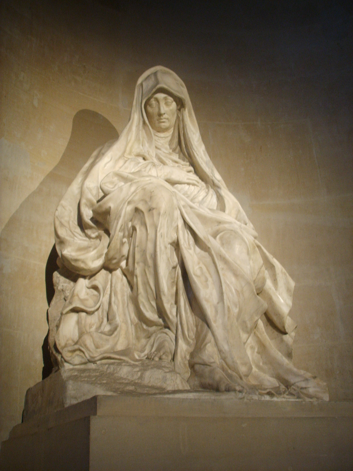 Église Saint-Paul-Saint-Louis La_Vierge_des_Douleurs_de_Germain_Pilon_(1586)